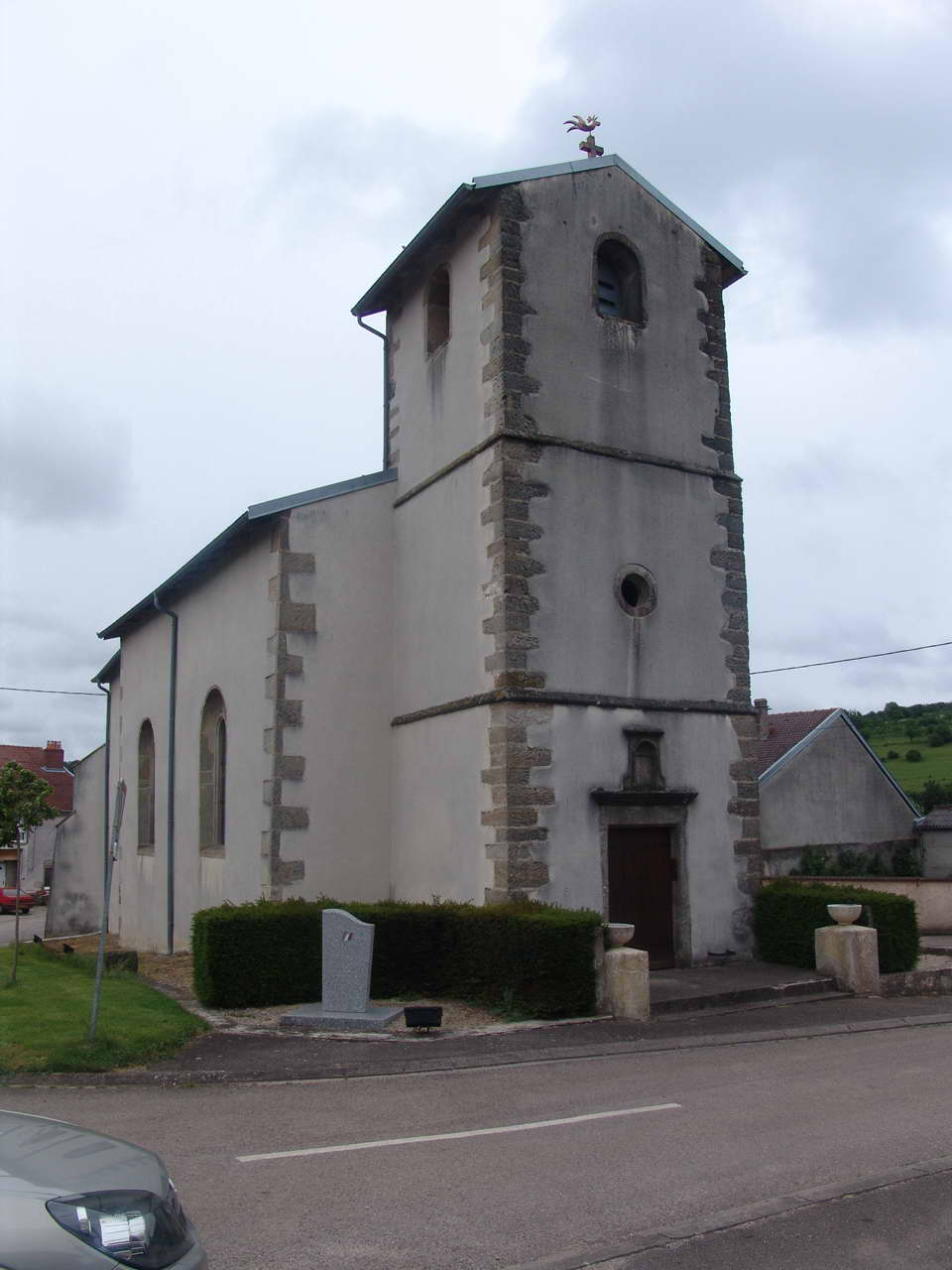 L'église de Remicourt (Vosges)